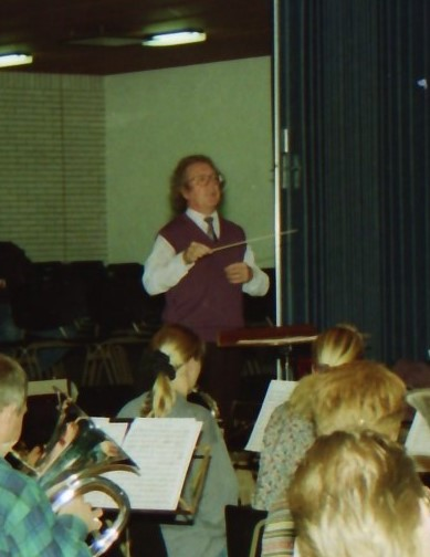 Dirigent van Nerijnen leidt de generale repetitie van Muziekvereniging Excelsior Westenholte voor het concours